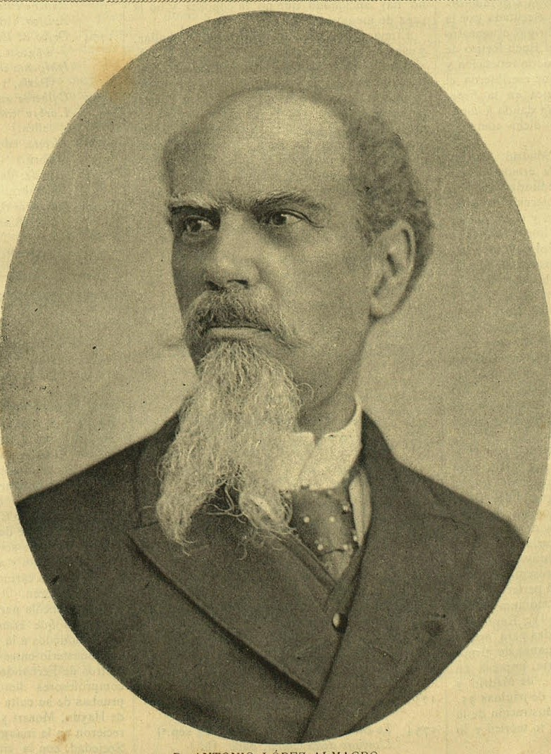 Ilustración Musical Hispano-Americana